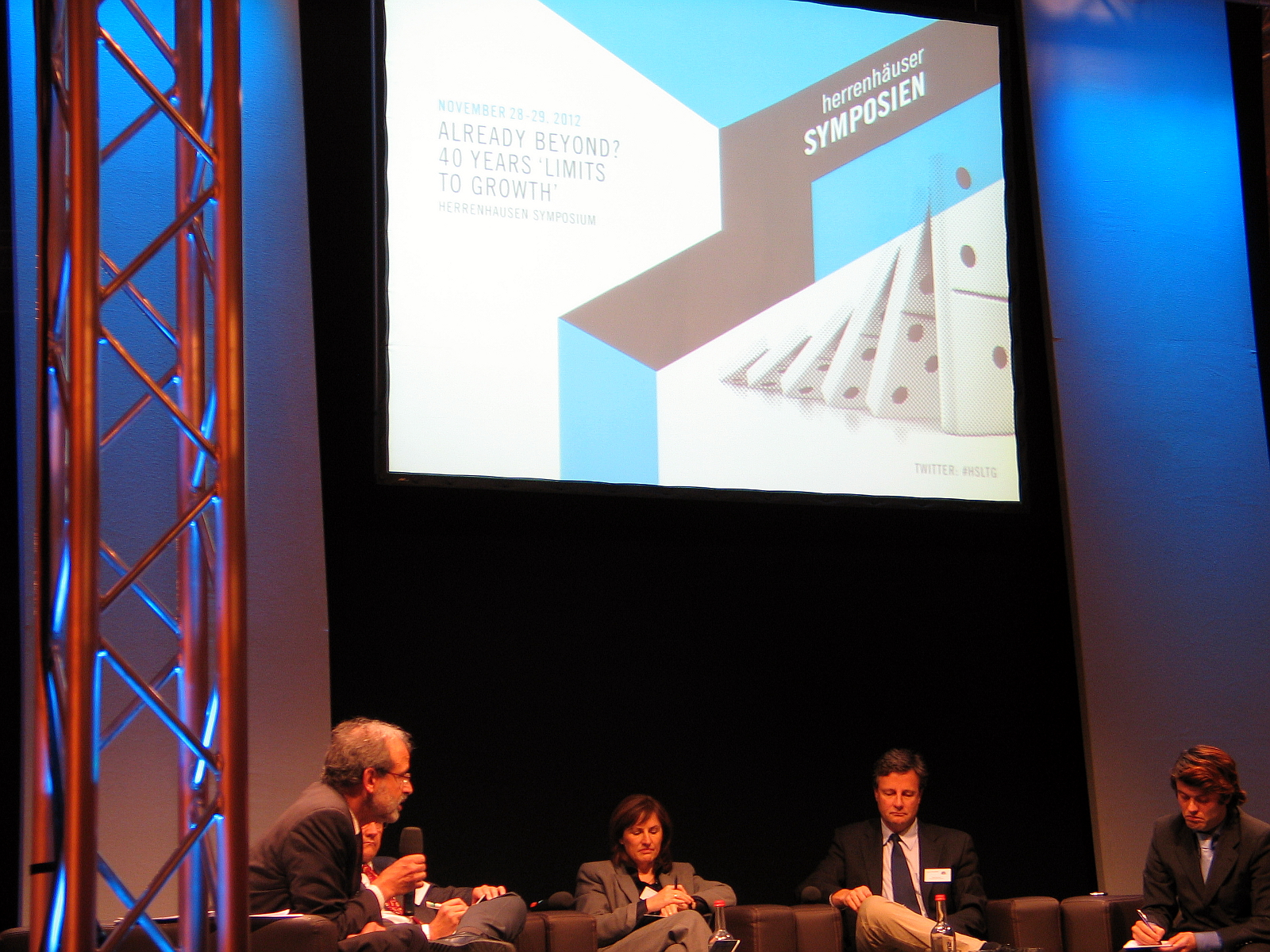 Impressions from the second day of the Herrenhausen Symposium Already Beyond? - 40 Years Limits to Growth, organized by VolkswagenStiftung in the Gallery building of Herrenhausen Gardens in Hanover